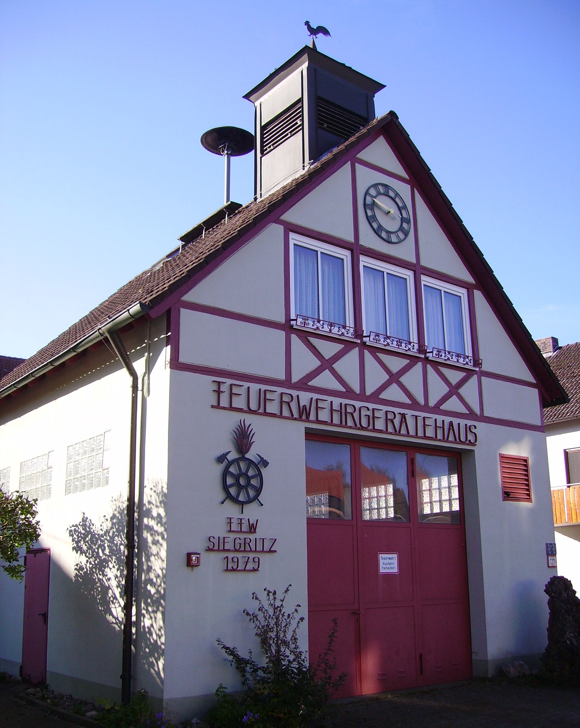 view of Siegritz, part of Heiligenstadt in Oberfranken in northern Bavaria, Germany